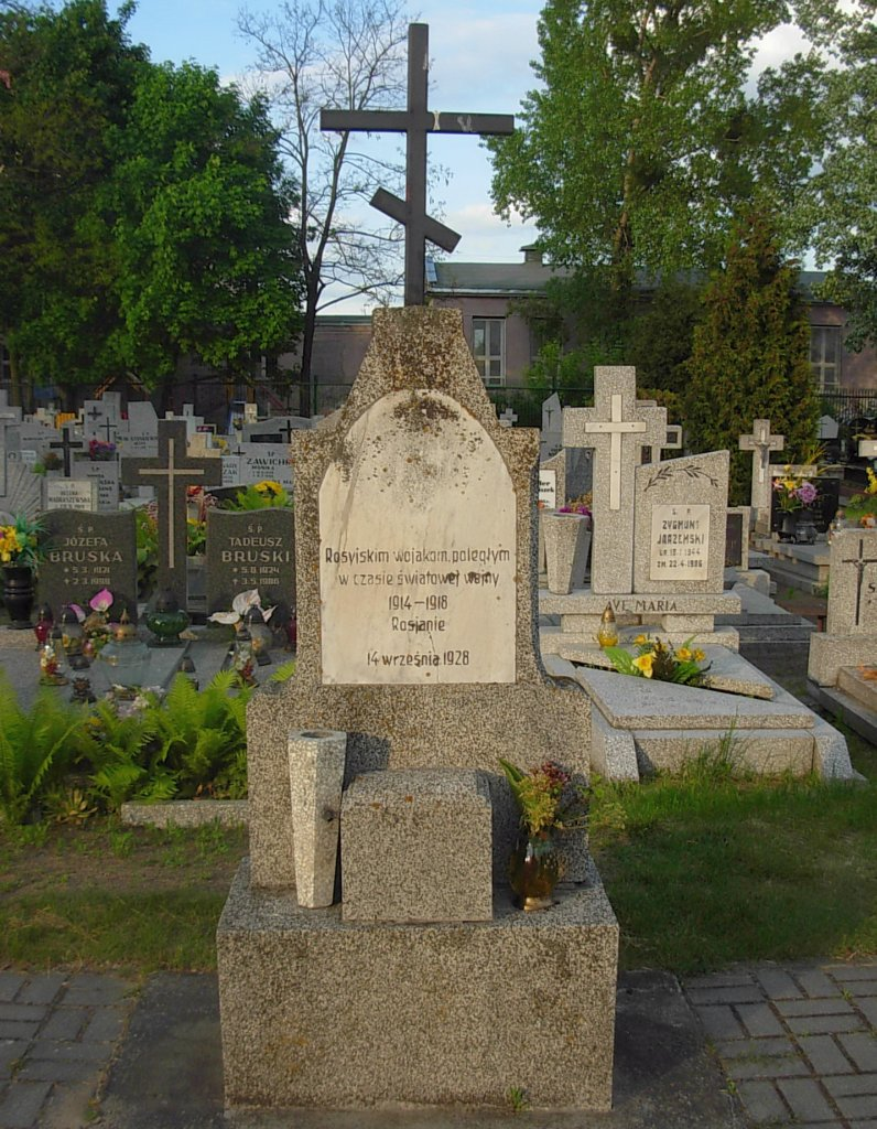 Cmentarz komunalny, Bydgoszcz ul Kcyńska. Nagrobek żołnierzy rosyjskich poległych w I wojnie światowej